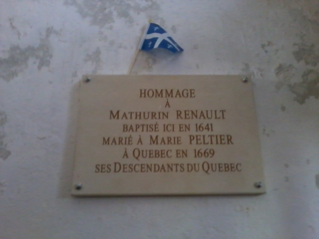 Plaque commémorative dans l'église d'Ars-en-Ré. Le texte est le suivant : "Hommage à Mathurin Renault baptisé ici en 1641 marié à Marie Peltier à Québec en 1669 Ses descendants du Québec"